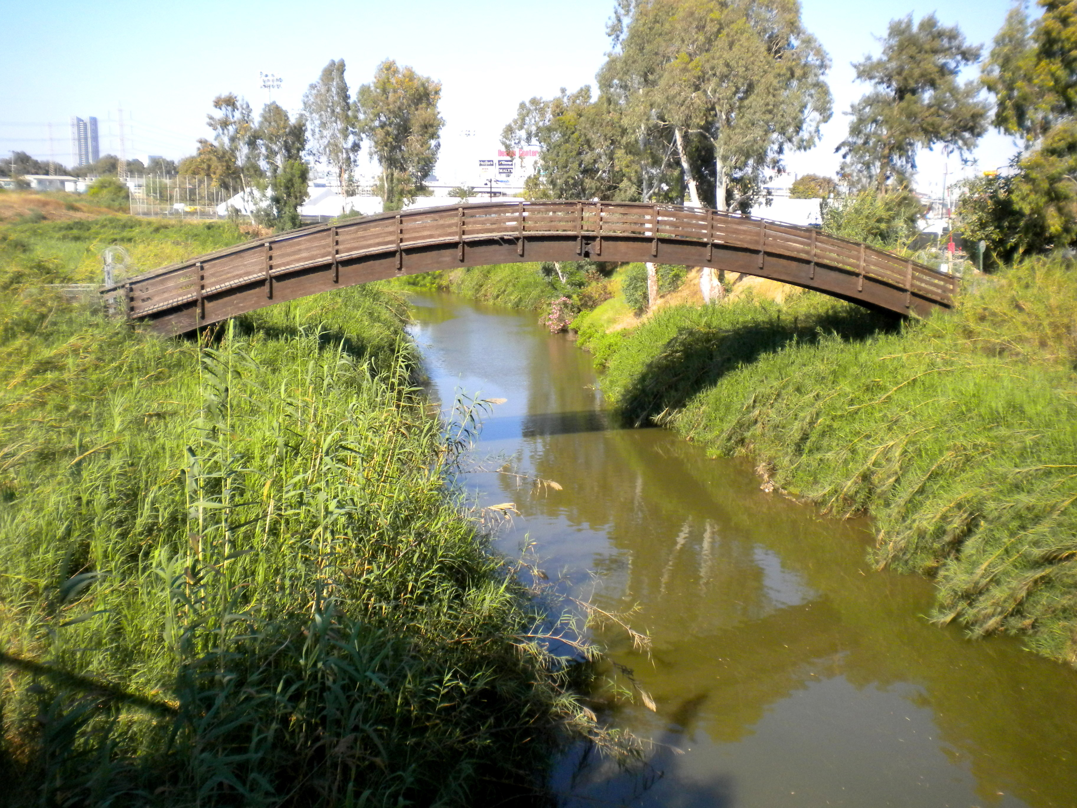 נחל הירקון הוא הנחל הגדול ביותר במערכת נחלי החוף של ארץ ישראל. בעת העתיקה התקיימו מספר נקודות התיישבות לאורך הירקון, בהם תל אפק, מגדל אפק, תל גריסה, תל קסילה, גבעת בית המטבחיים ותל כודאדי בשפך הירקון. שפך הירקון לים היווה באותה תקופה נקודת עגינה נוחה לסירות. באותה תקופה חלף אפיקו של הירקון צפונה למיקומו הנוכחי, על שדרות רוקח של ימינו, למרגלות תל קסילה.